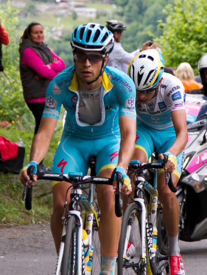 080 kopgroep aru landa kruiswijk